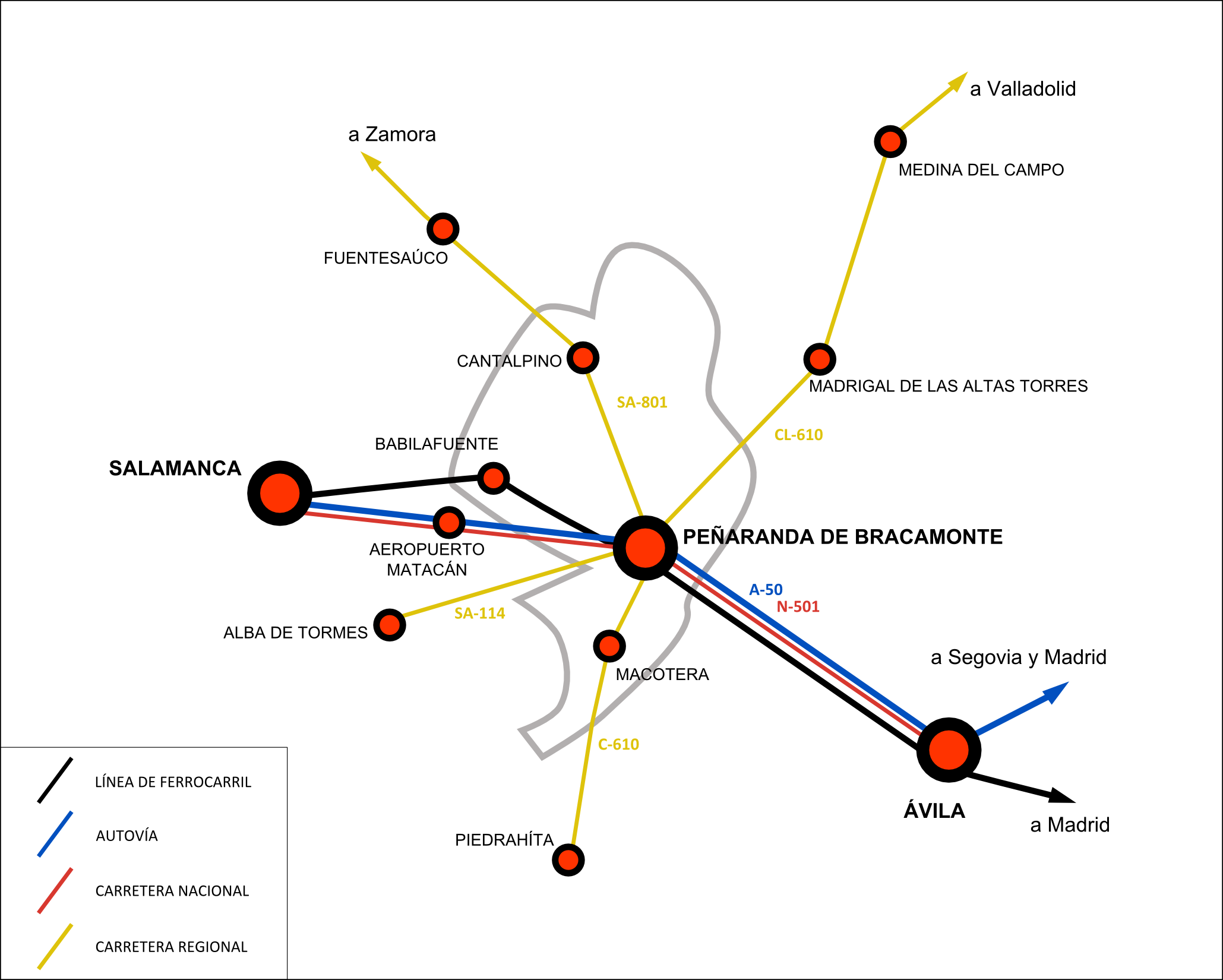 Plano esquemático de las principales líneas de comunicación de Peñaranda de Bracamonte (Salamanca). En la figura se pueden apreciar la leyenda de las líneas de comunicación y la delimitación en línea gris ancha de la comarca de Tierra de Peñaranda, observándose el nudo de comunicaciones regional que es la localidad peñarandina.